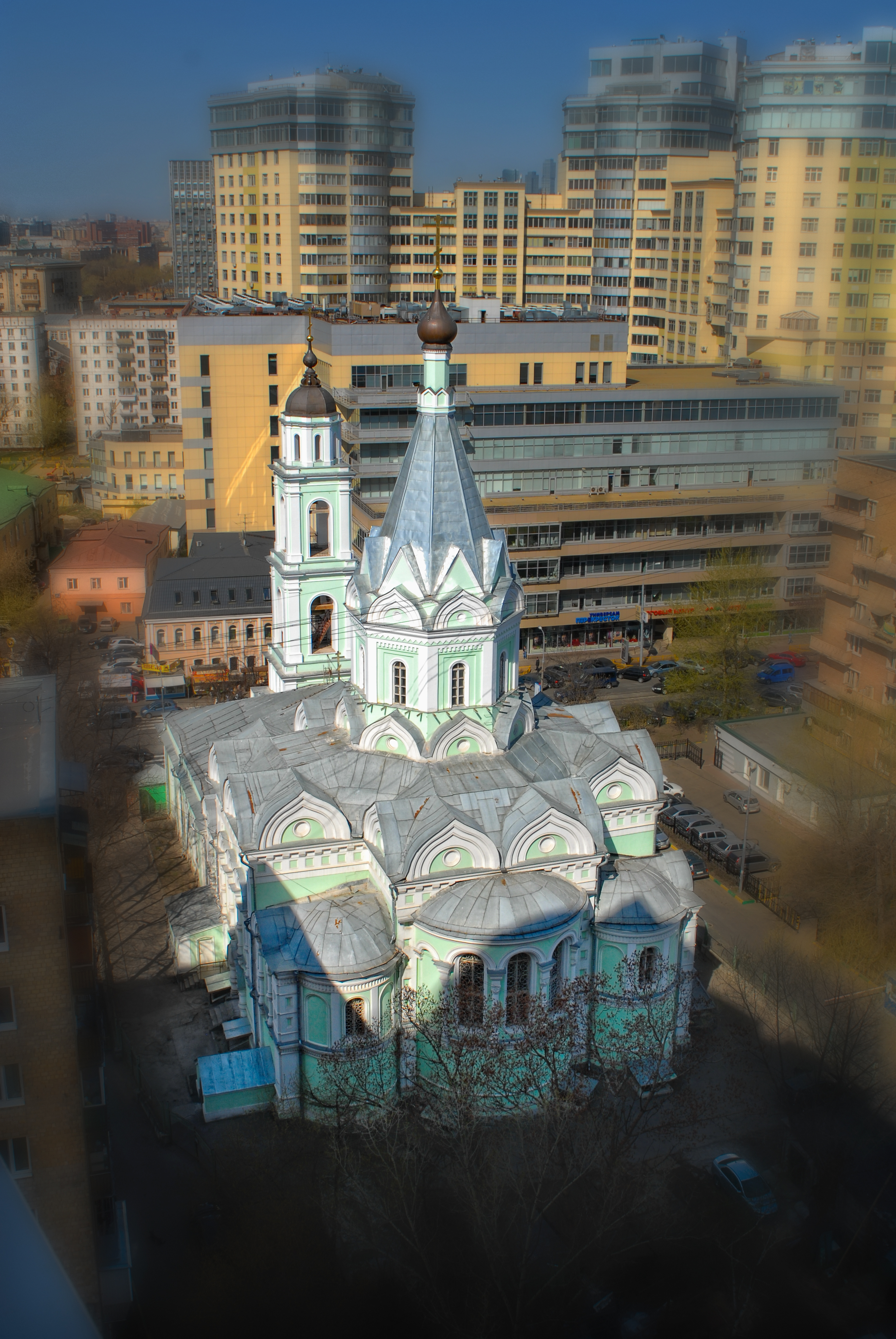 Храм Троицы Живоначальной на Шаболовке